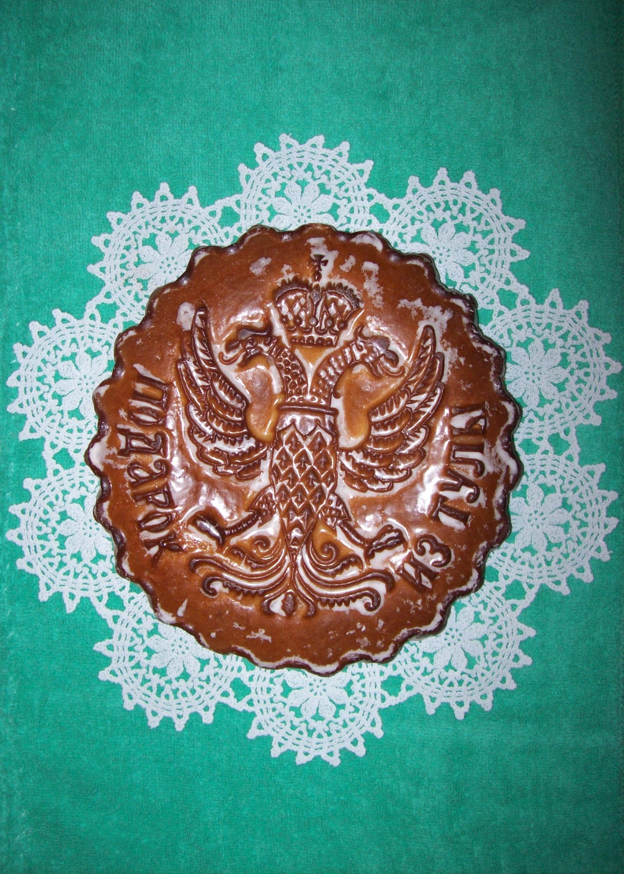 Тульский пряник круглый